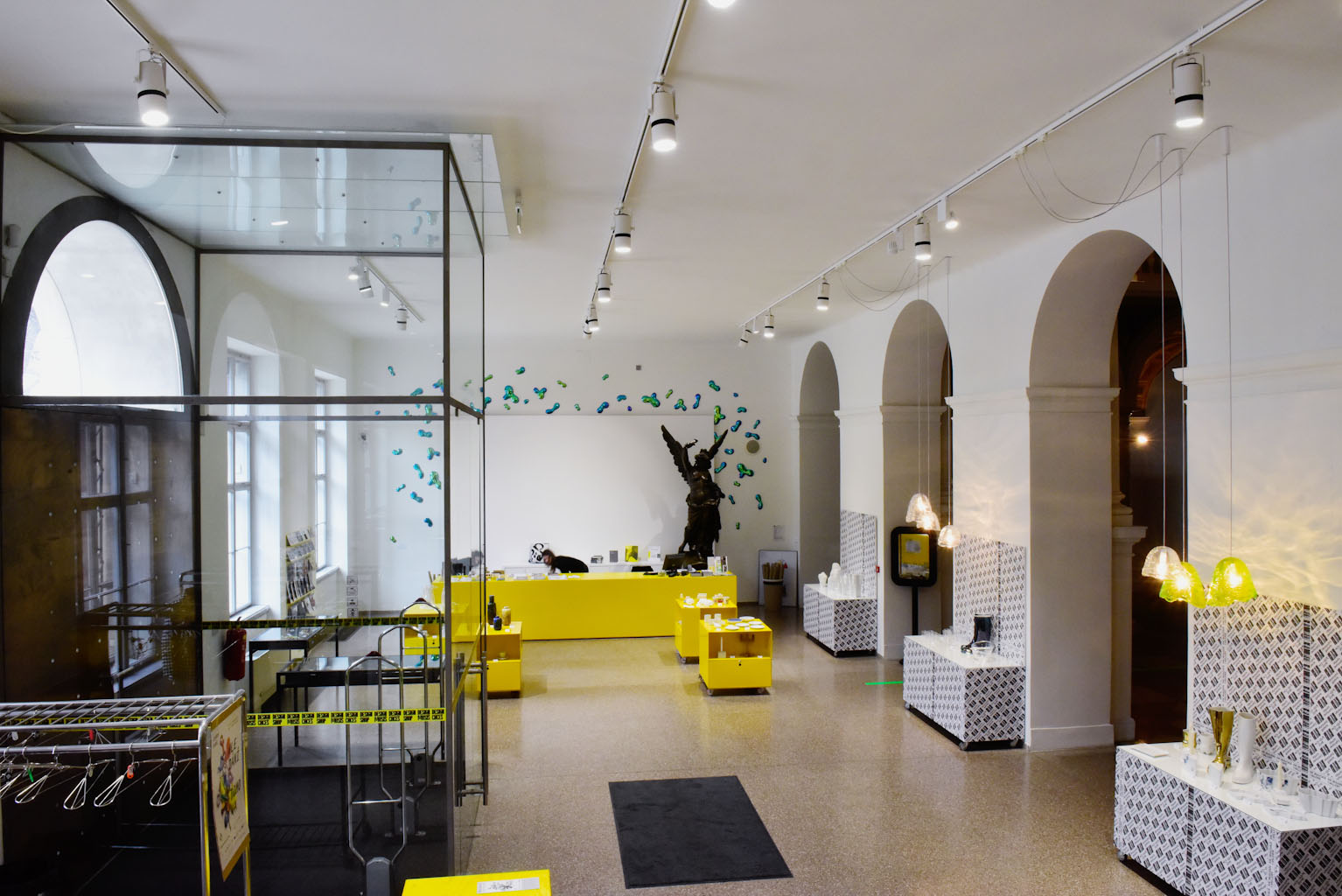 Designshop MG v Uměleckoprůmyslovém muzeu